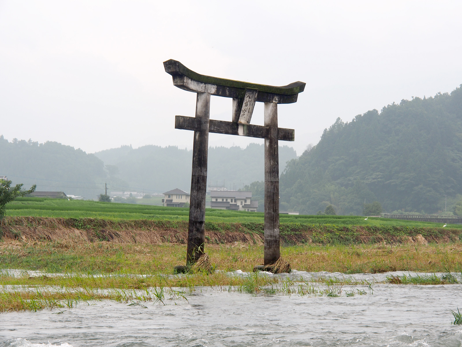 緒方三社二の宮鳥居（大分県豊後大野市）